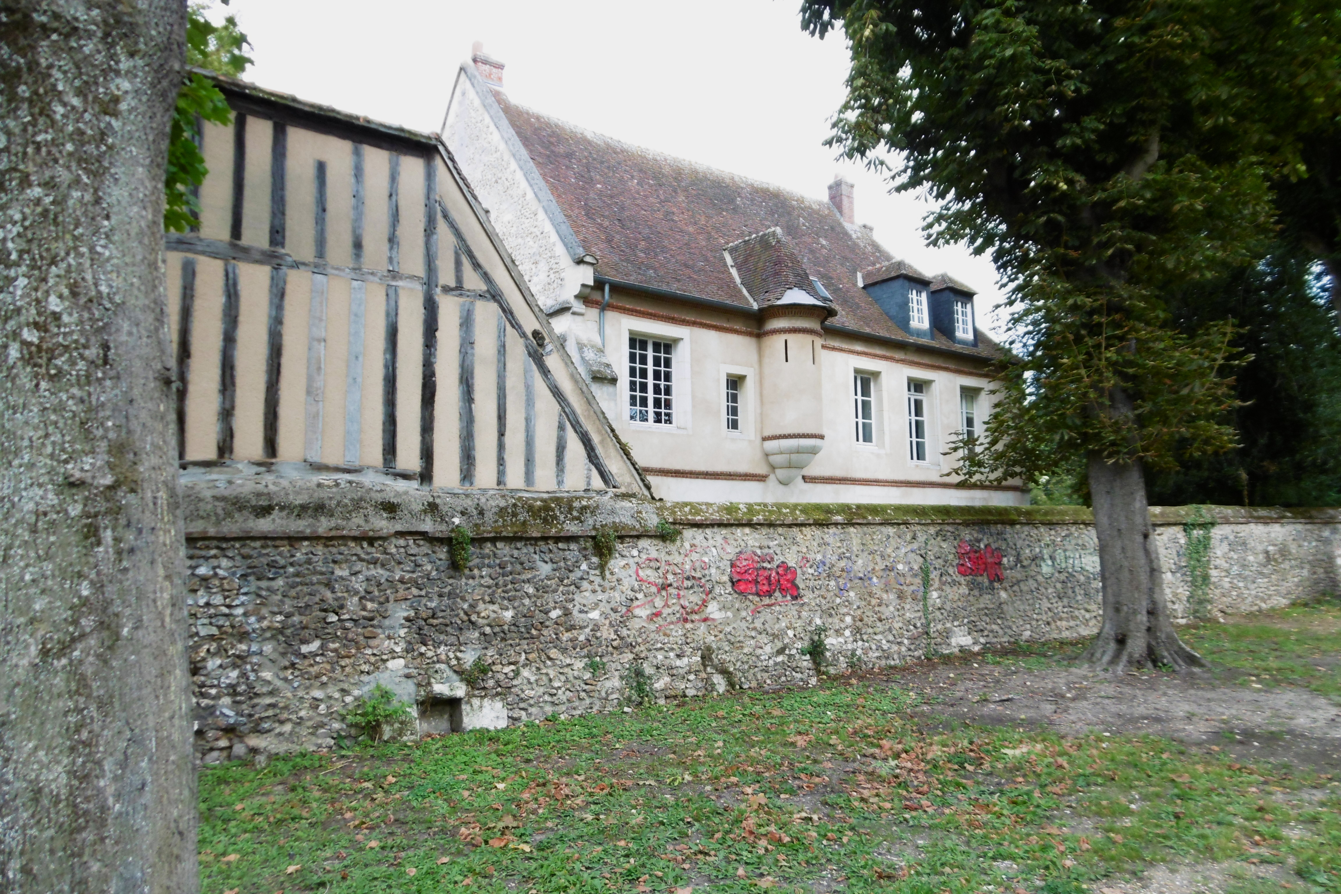 Derrière de l'immeuble du 14 de la rue Charles-Corbeau à Évreux. Prise de vue : jardin de l'évêché.